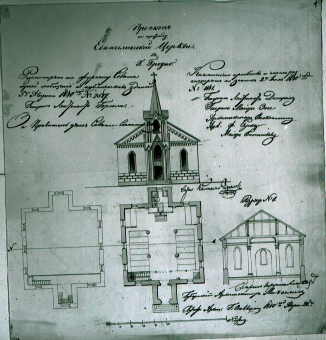 Гродно. Проект евангелической церкви. Архитекторы Г.Г. Валлерт, Михаелис. 1840 г. РГИА